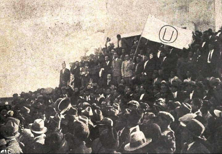 UNMSM Manifestación 1930 Bandera FEU